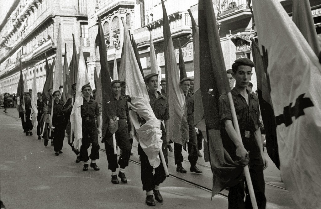 Título original: Desfile de tropas por las calles de San Sebastián (8/20) Localización: San Sebastián (Guipúzcoa)